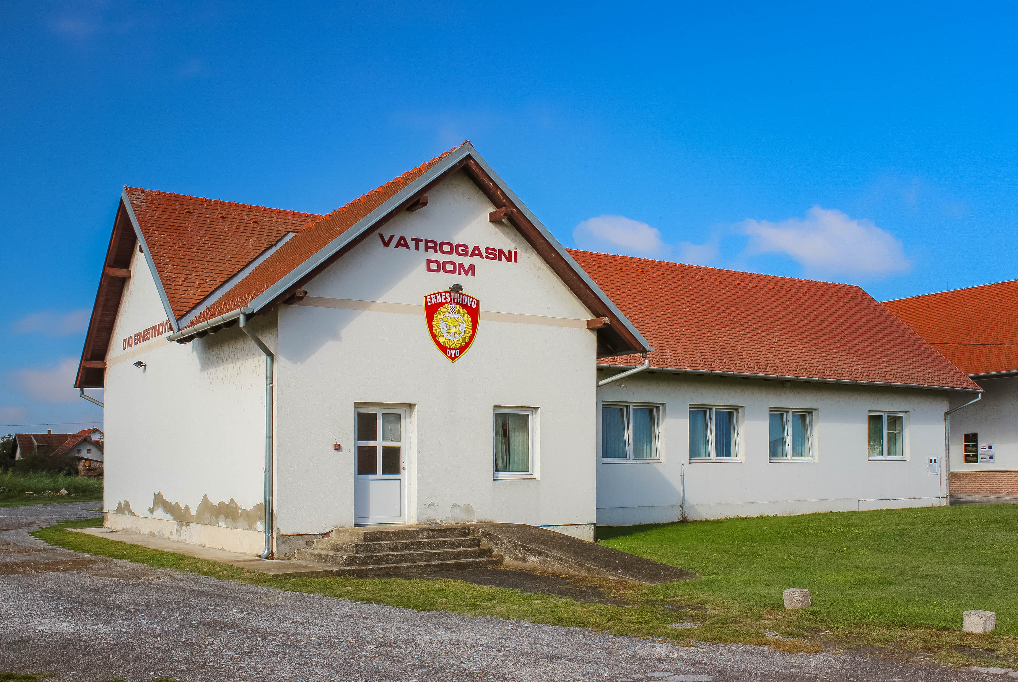 Vatrogasni dom